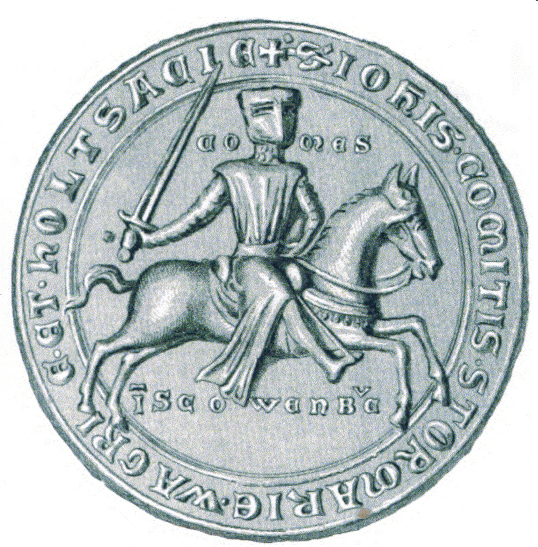 Siegel des Johann I. (Holstein-Kiel).